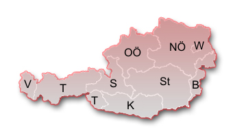 Österreich